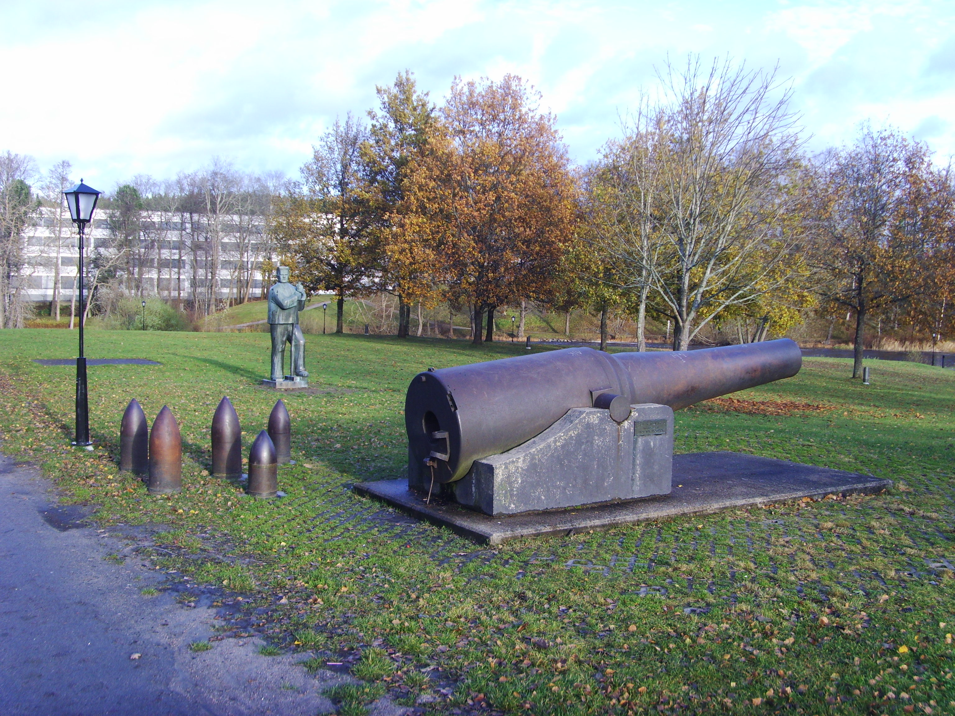 24 cm kanon M/70, tillverkad vid Finspongs styckebruk. Uppställd vid bruksbostäderna från 1700-talet, i Finspångs centrum.